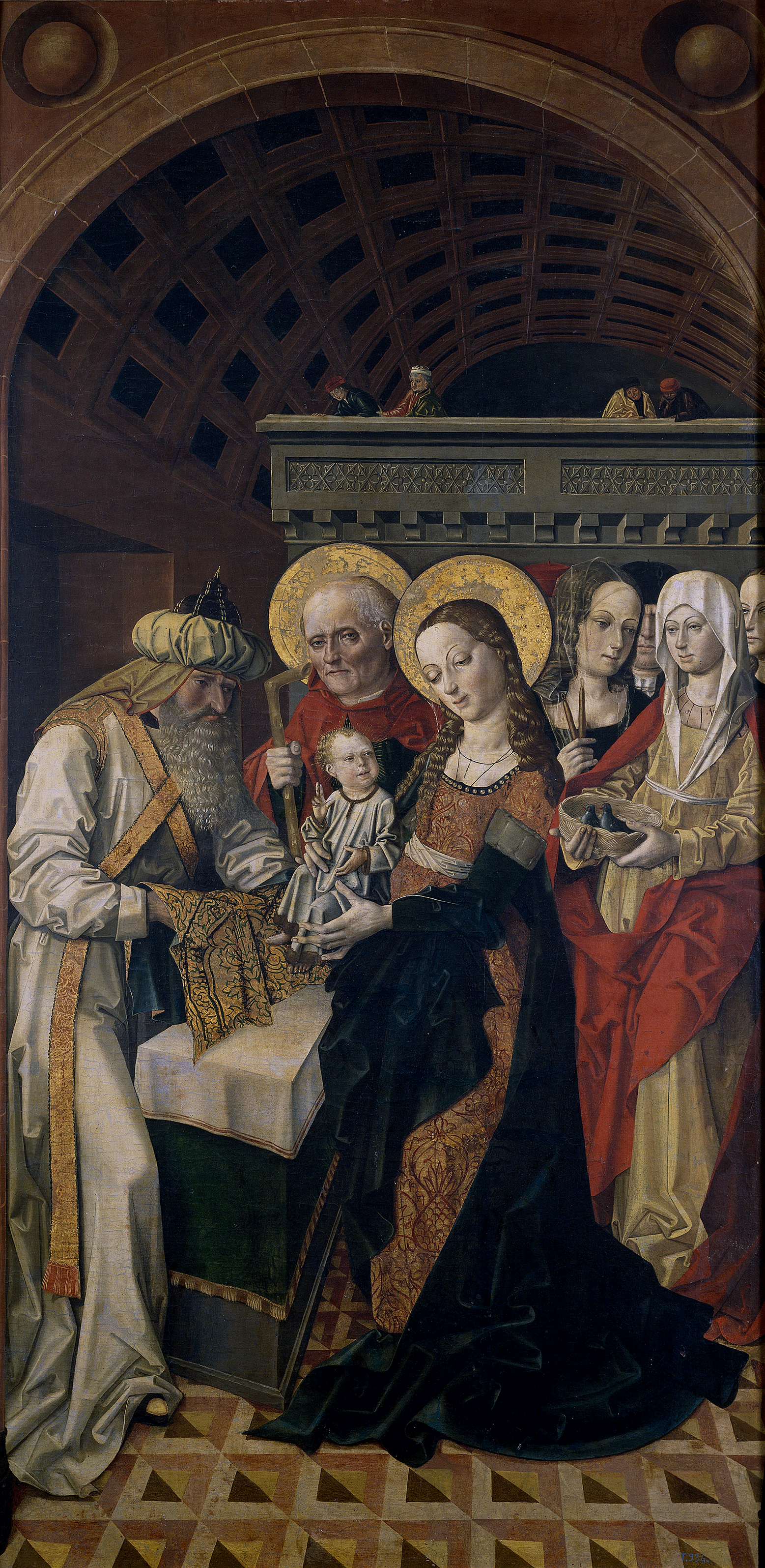 La obra representa el momento en que los padres del Niño Jesús presentaron a su hijo en el templo de Jerusalén, como estaba prescrito en las leyes de Moisés.